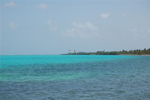 Playa y mar de Costa Maya en Río Huach